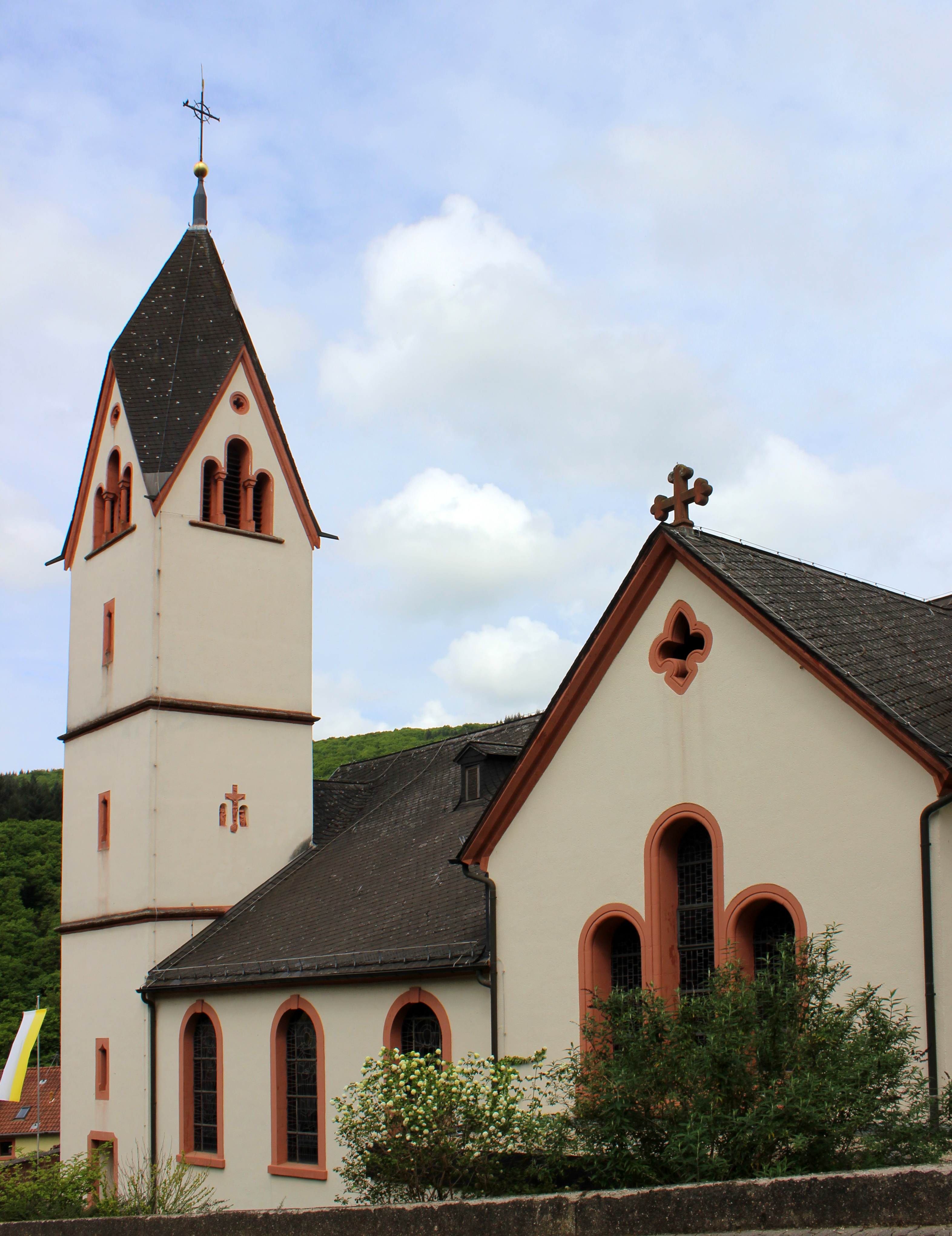 Die katholische Pfarrkirche St. Antonius in Saarhölzbach, einem Ortsteil der Gemeinde Mettlach, Landkreis Merzig-Wadern, Saarland